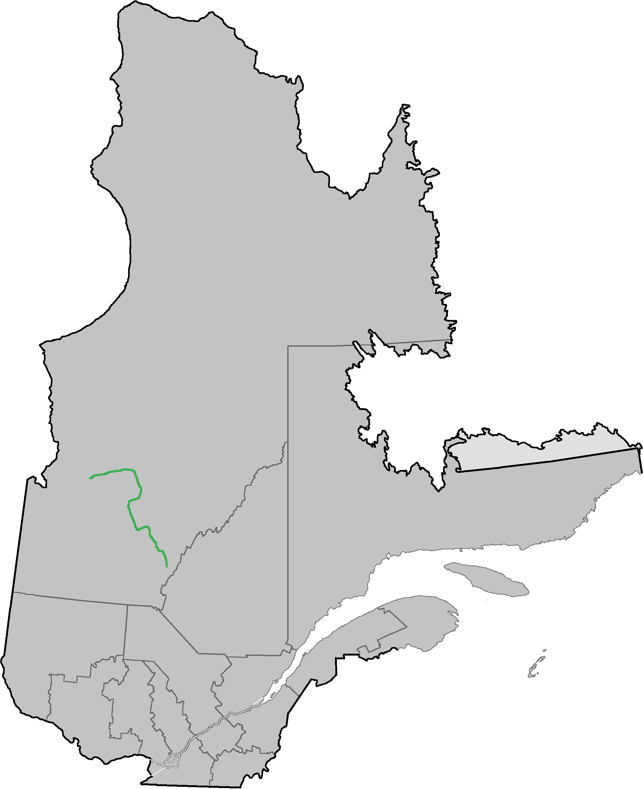 Carte de la route québécoise au Nord-du-Québéc